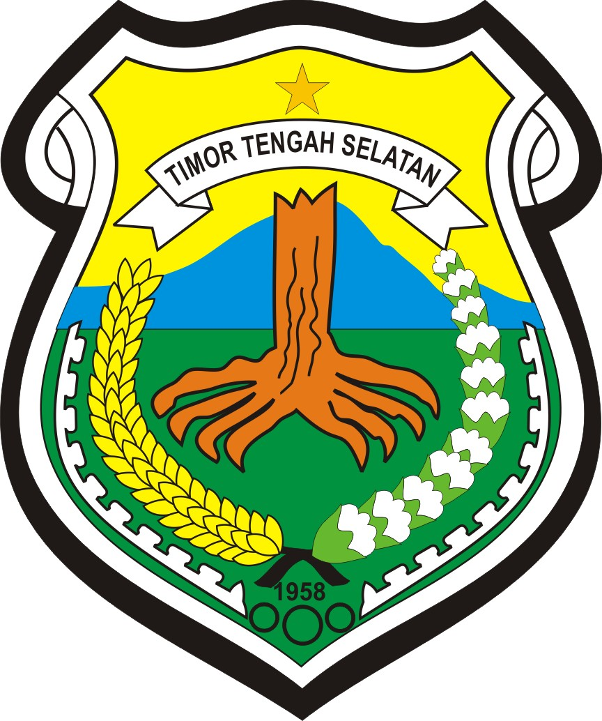 Wappen des Regierungsbezirks Südzentraltimor